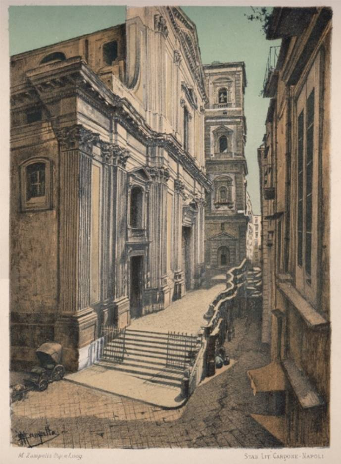 Napoli, Chiesa di Sant'Agostino alla Zecca. Autore sconosciuto (Raffaele D'Ambra).